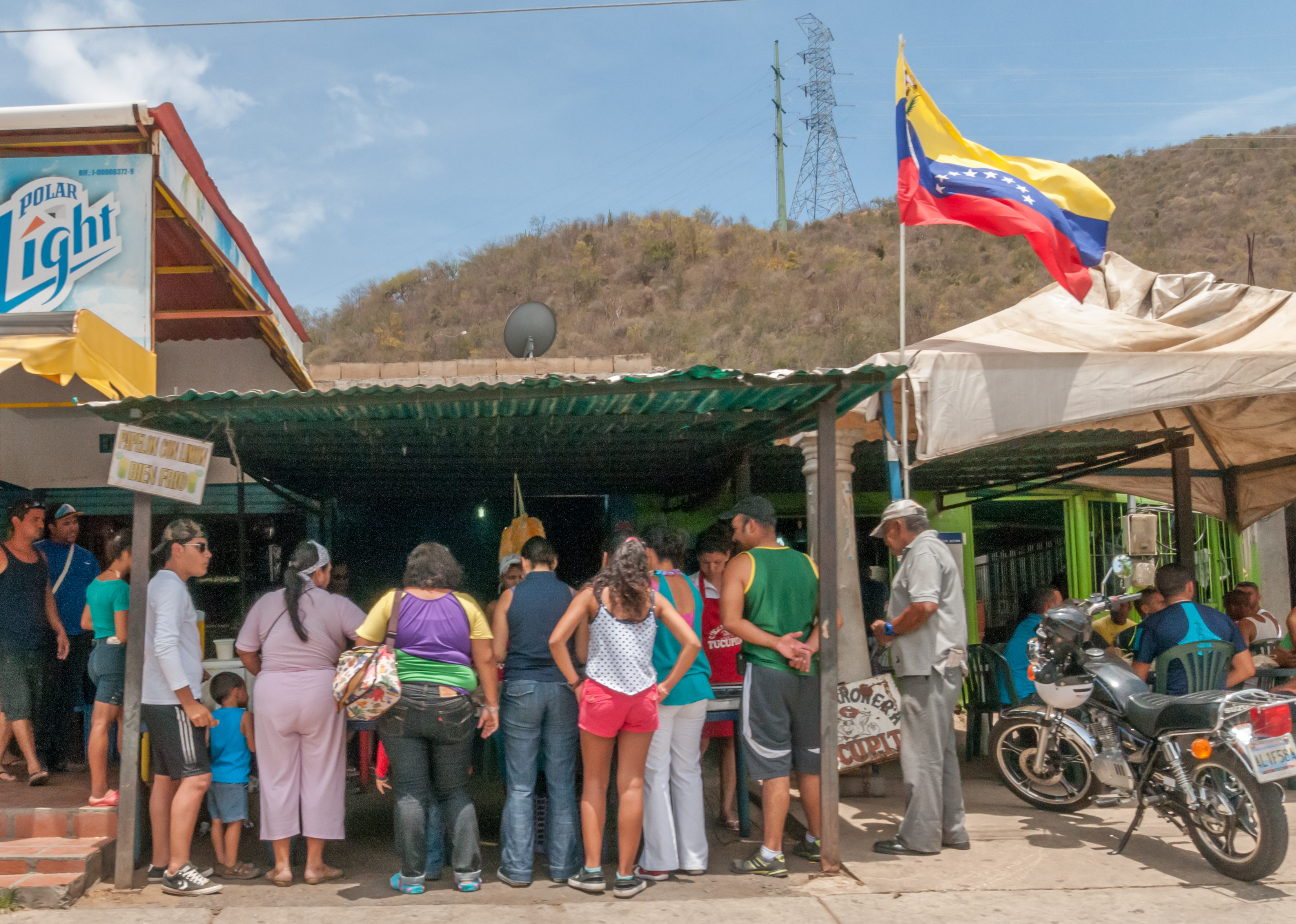 Chicharronera Tucupita